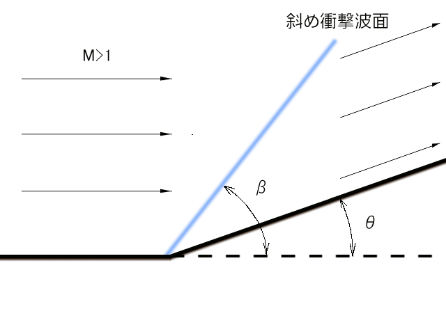 oblique shock